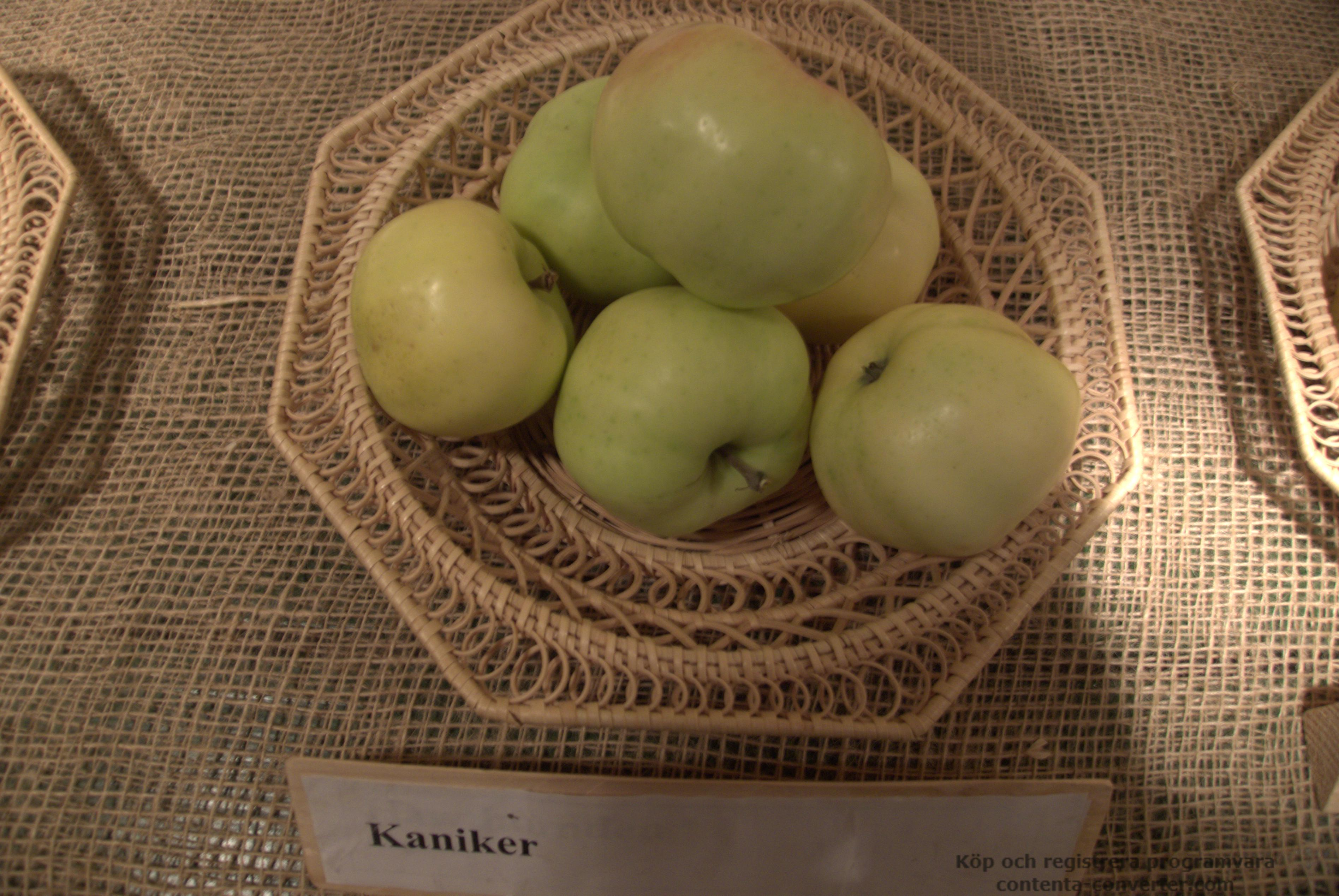 Äpplen av sorten Kaniker